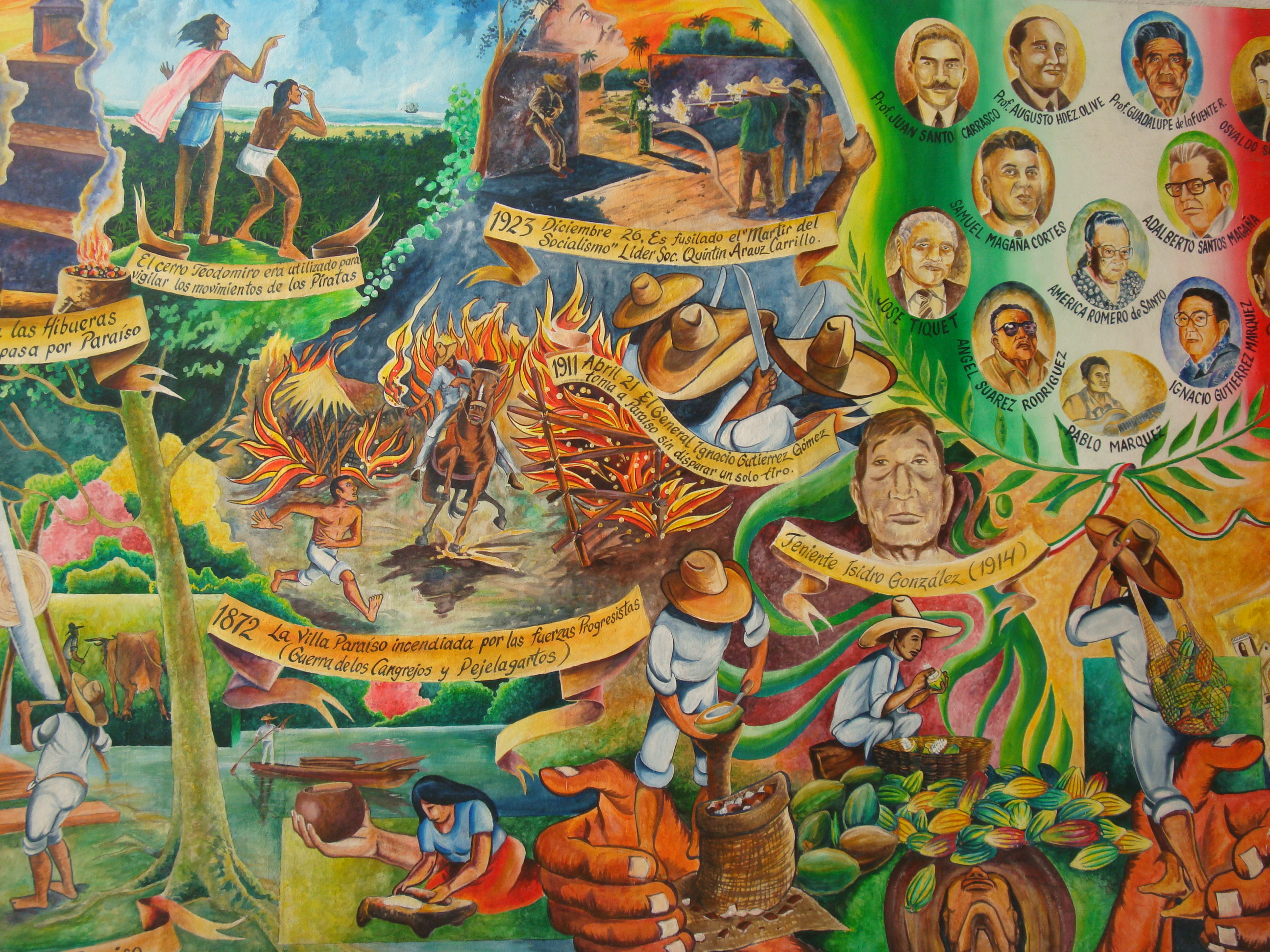 Mural "Historia de Paraíso" realizado por el pintor muralista Homero Magaña Arellano, y ubicado en el Palacio Municipal, Paraíso, Tabasco.